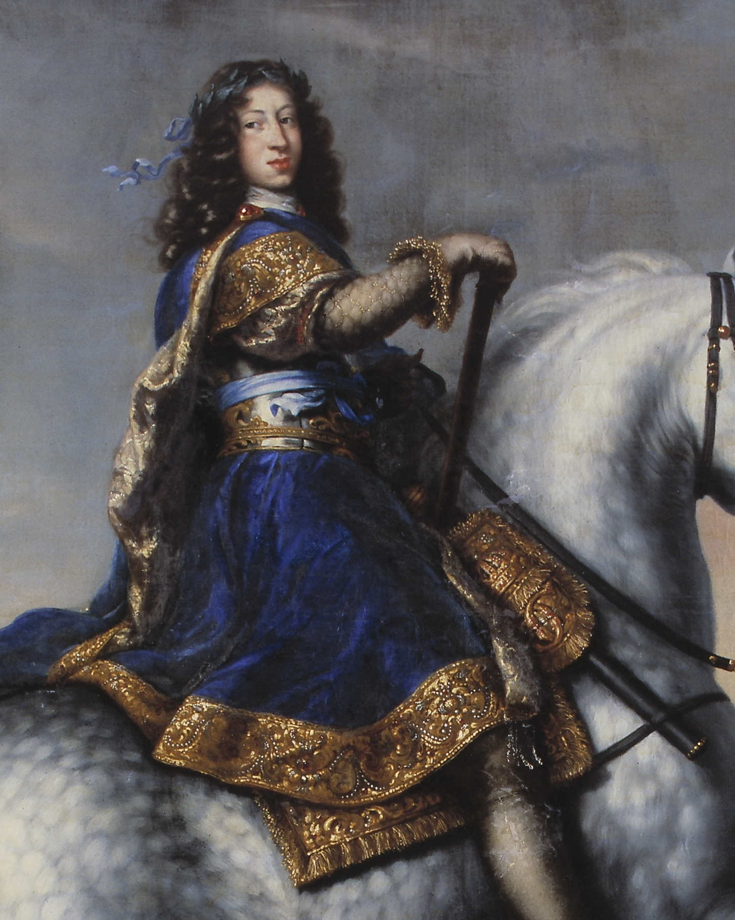 Karl XI